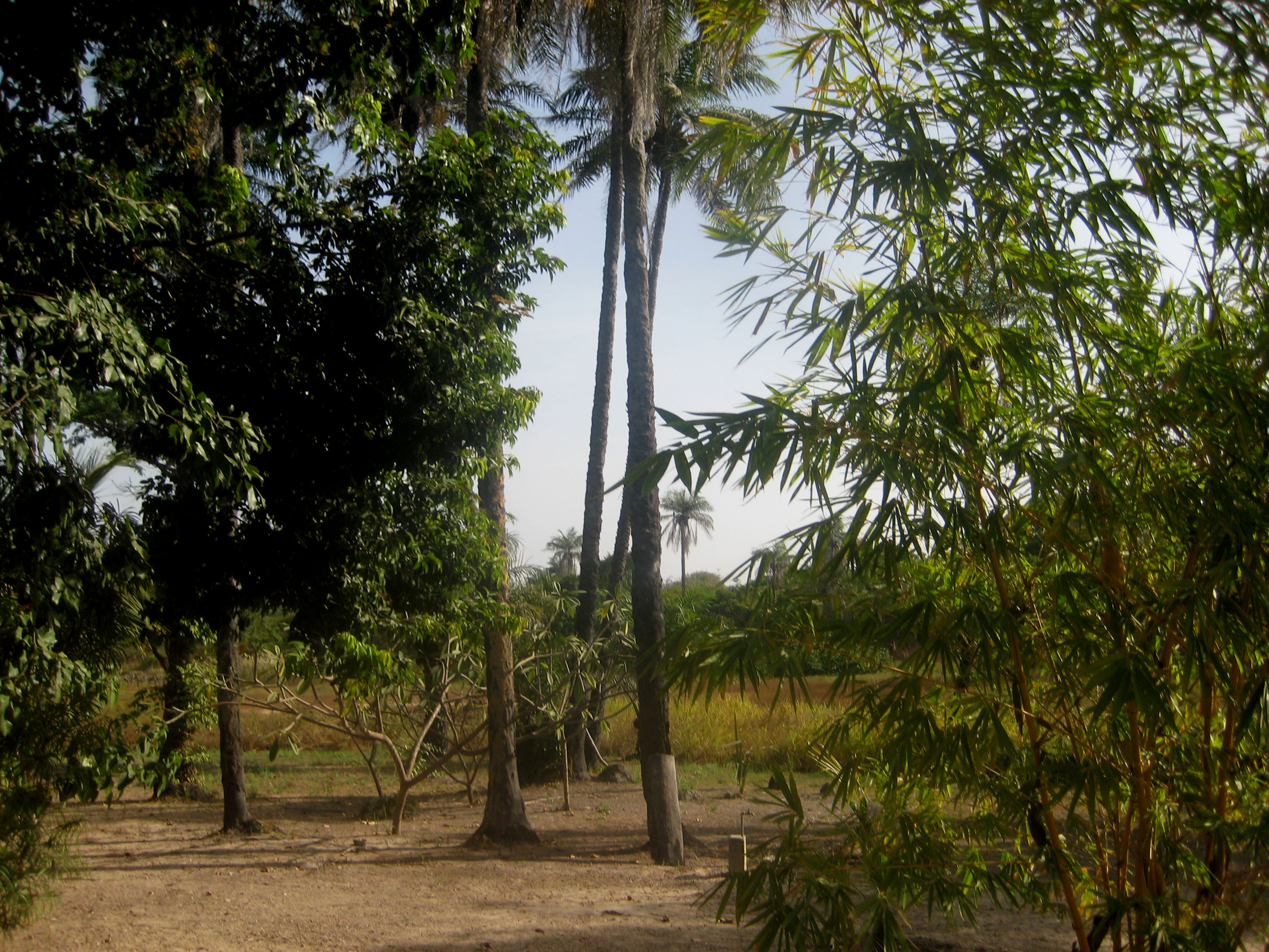 Forêt à Kafountine (Casamance, Sénégal)